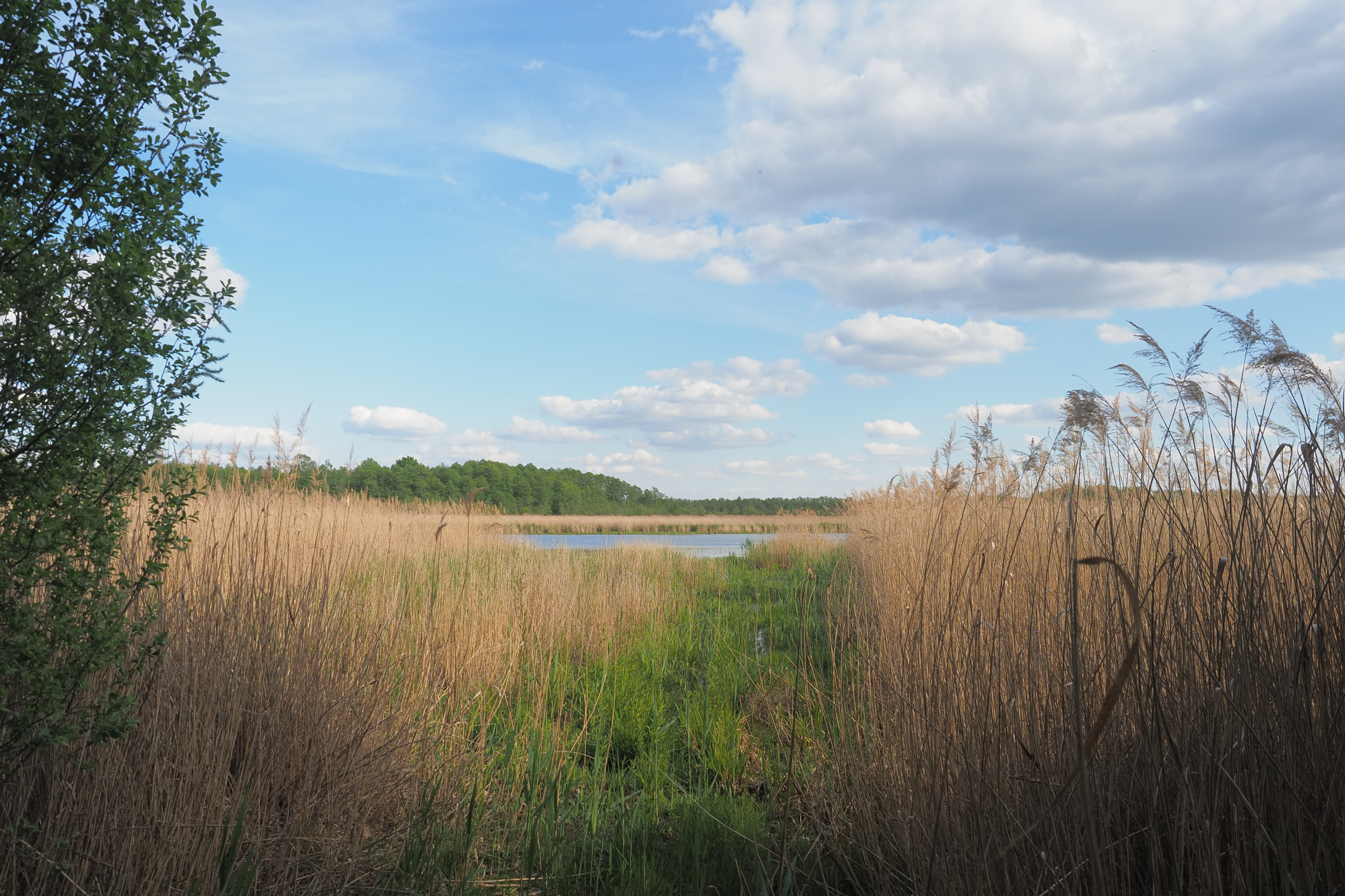 Naturschutzgebiet "Spannteich Knappenrode" in Sachsen